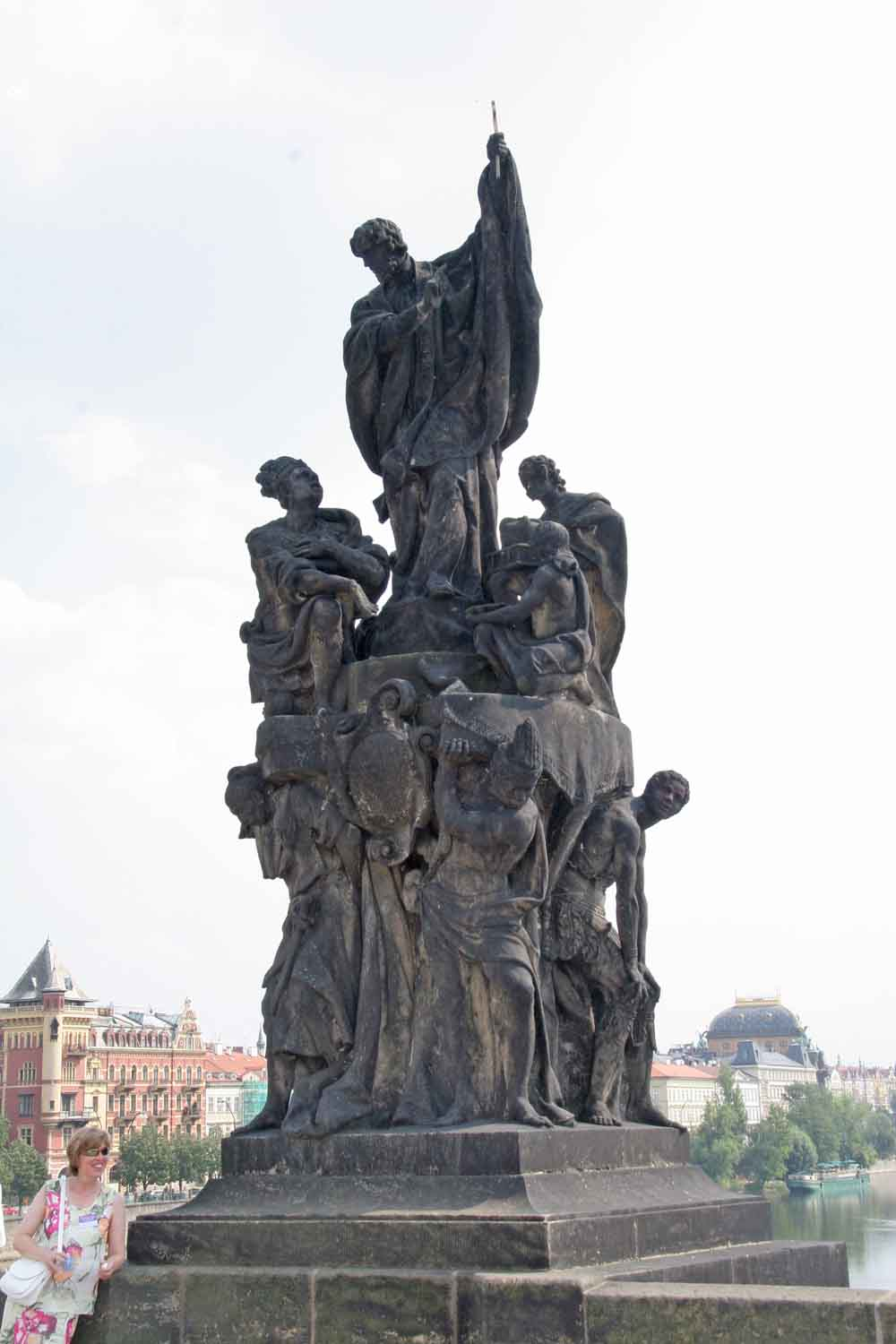 Česky: Sousoší Svatého Františka Xaverského na Karlově mostě